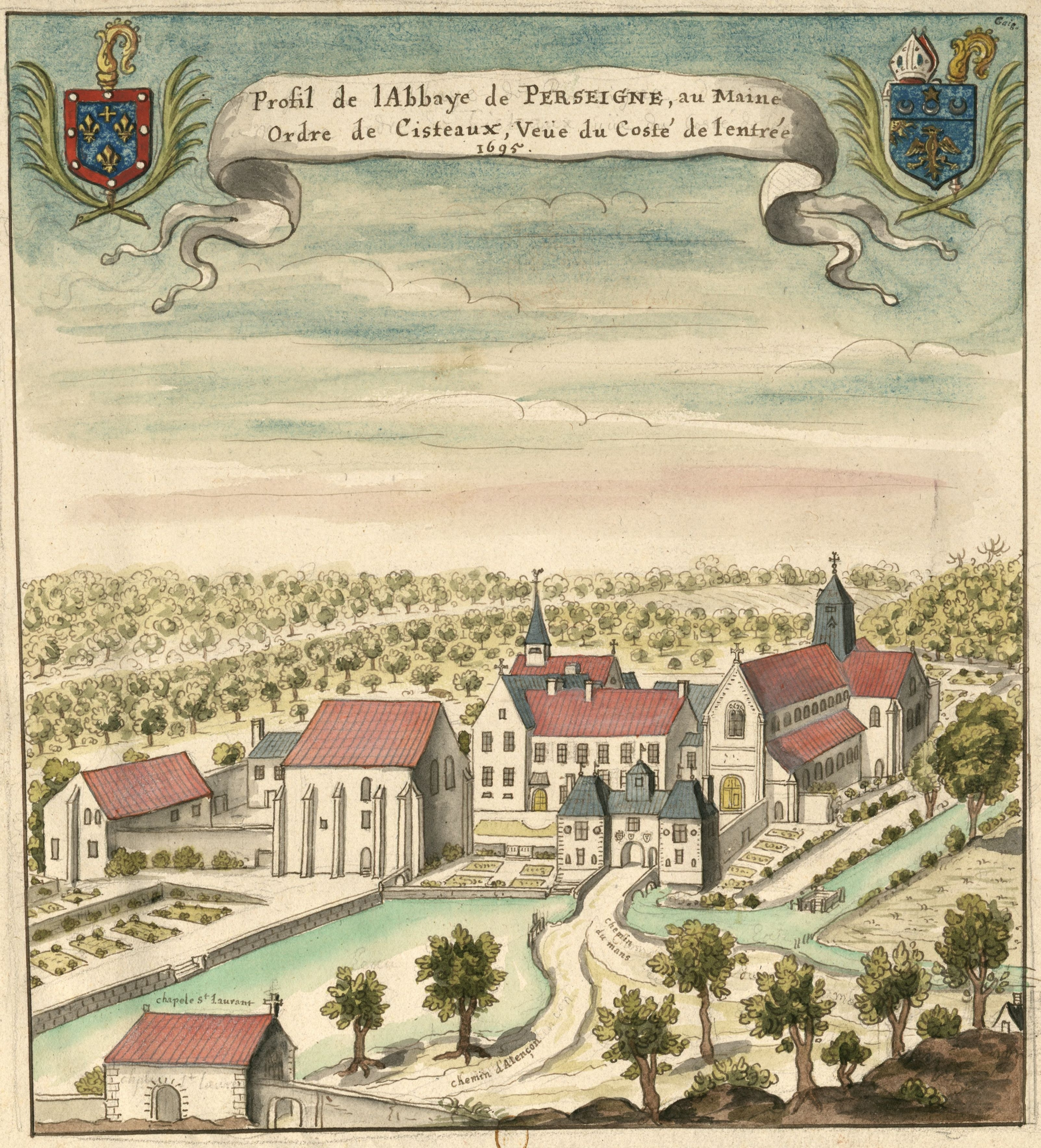 Profil de l'Abbaye de Perseigne au Maine, Ordre de Cisteaux, Veüe du costé de l'entrée // 1695 : [dessin] / [Louis Boudan]